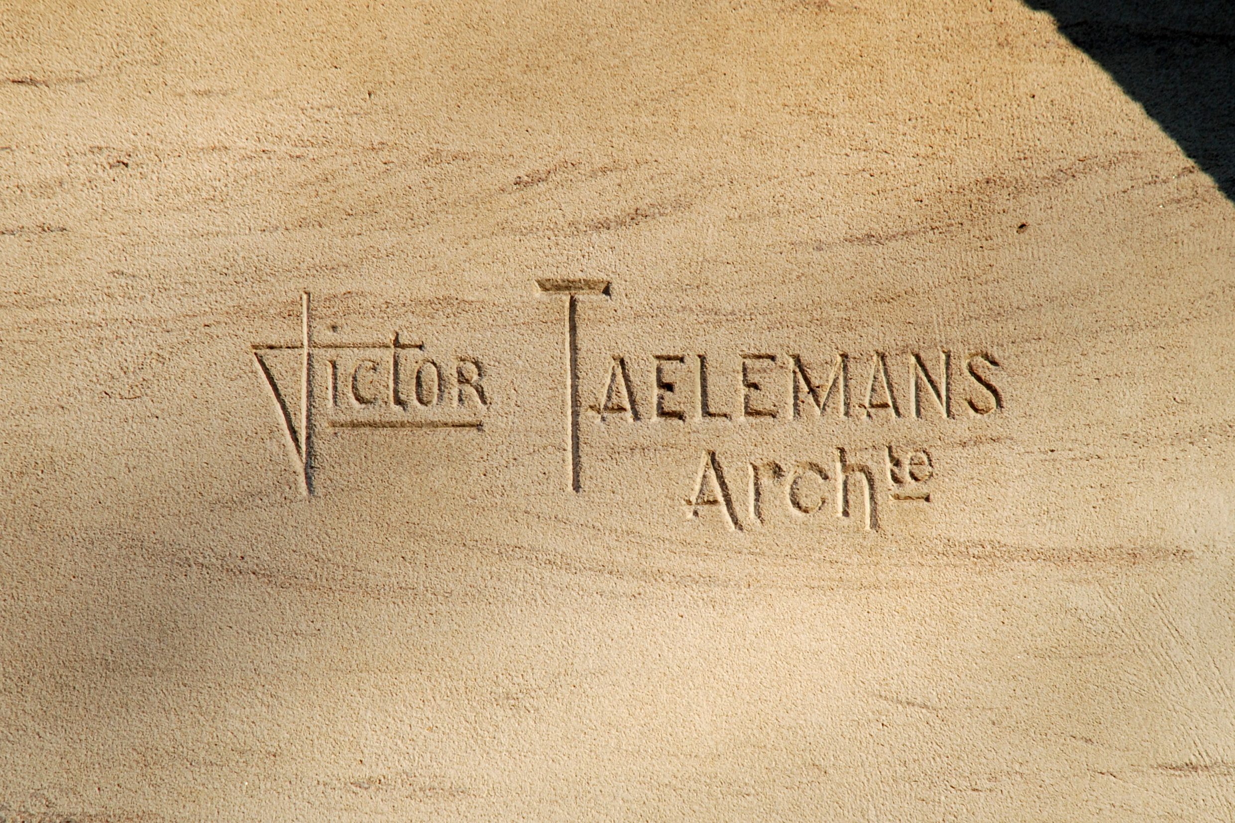 Belgique - Bruxelles - Villa Elisa (Art nouveau, architecte Victor Taelemans, 1899)